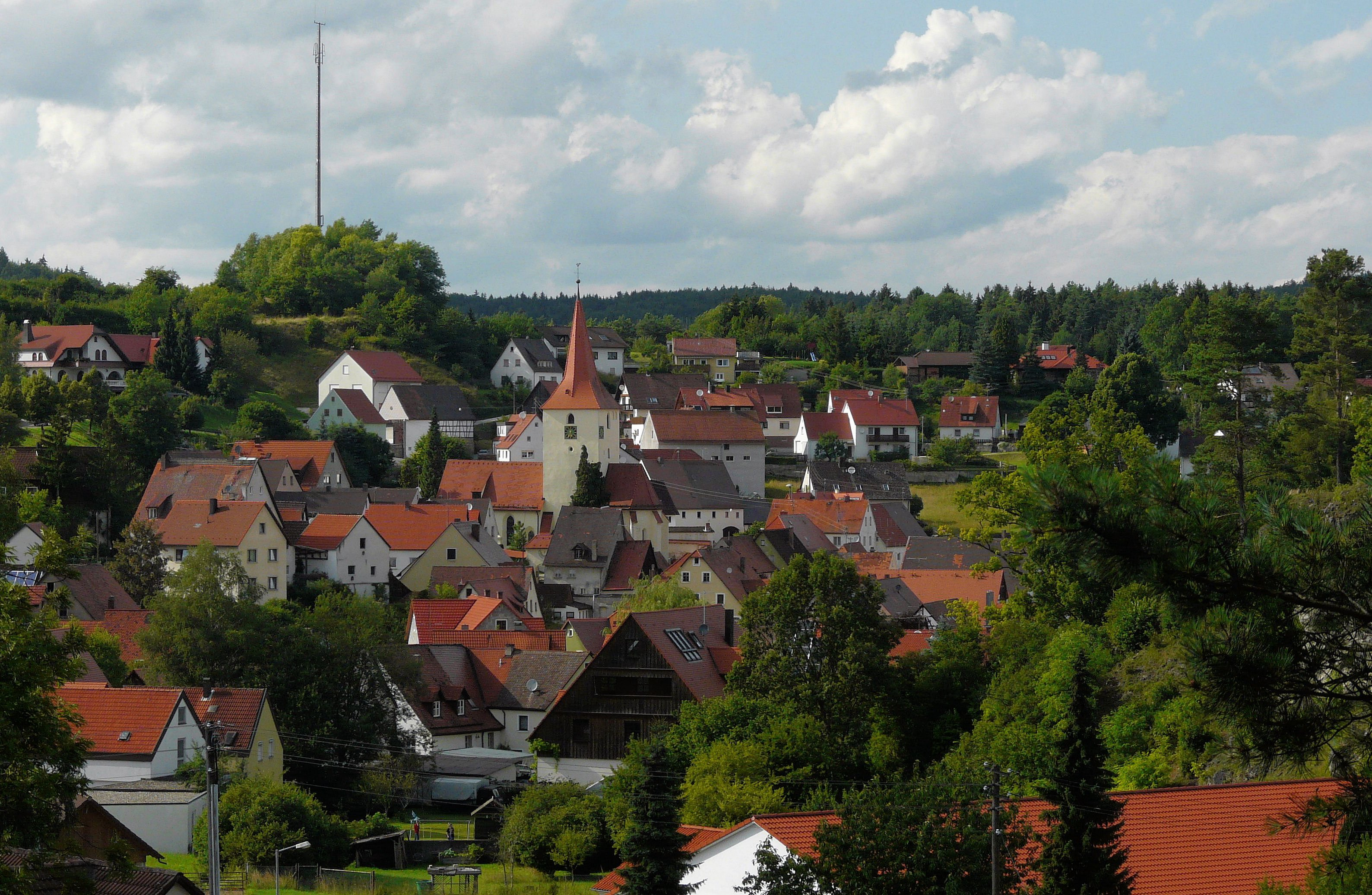 Ortsansicht von Alfeld